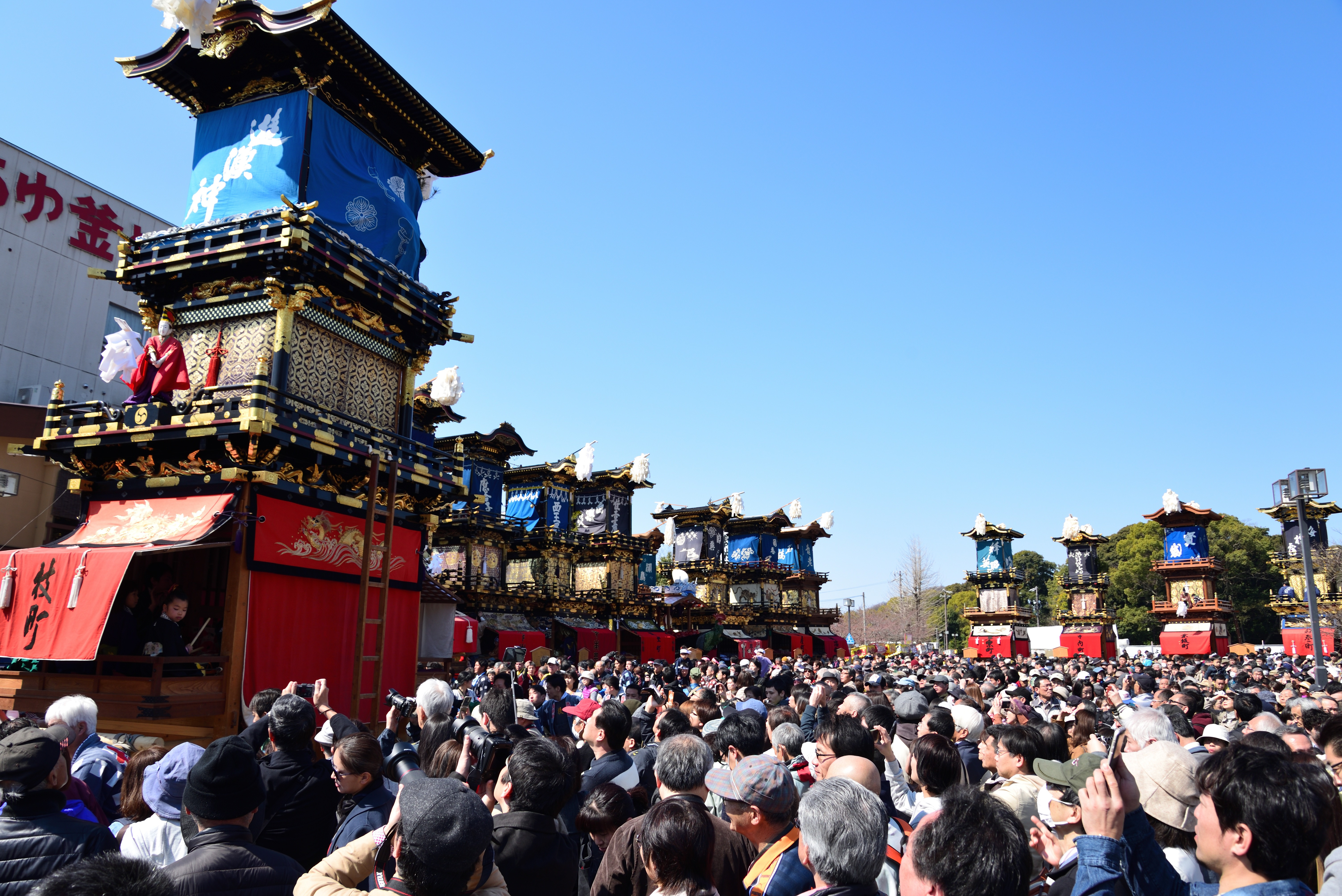 犬山祭の様子